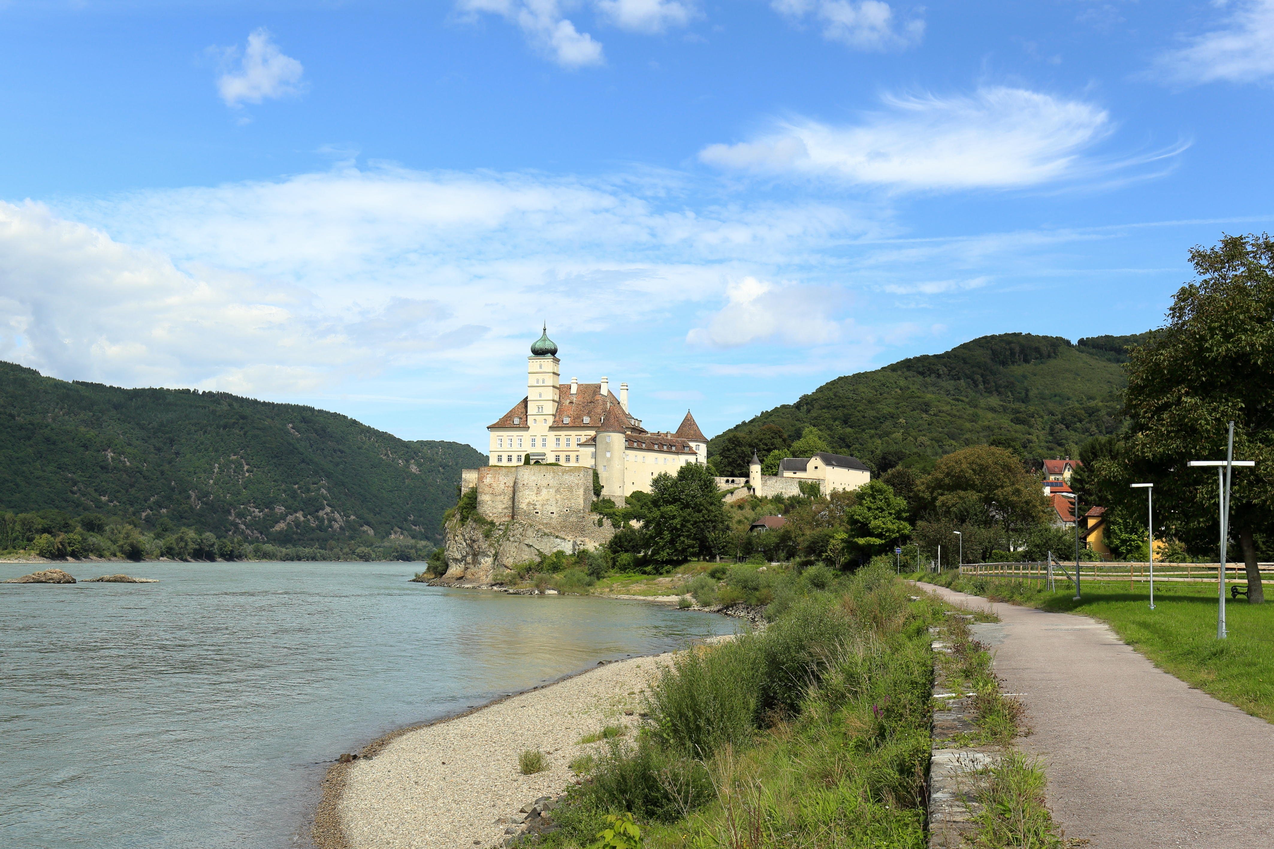 Schloss Schönbühel in der niederösterreichischen Marktgemeinde Schönbühel-Aggsbach. Das auf einer ebenen Terrasse über steilen Granitfelsen direkt am rechten Donauufer errichtete Schloss kennzeichnet wahrzeichenhaft den Eingang in die Wachau. Der zerstörte und verfallene Bau des Mittelalters und des 17. Jahrhunderts wurde unter Verwendung der alten Fundamente und teilweise der Außenmauern 1819/21 neu errichtet.